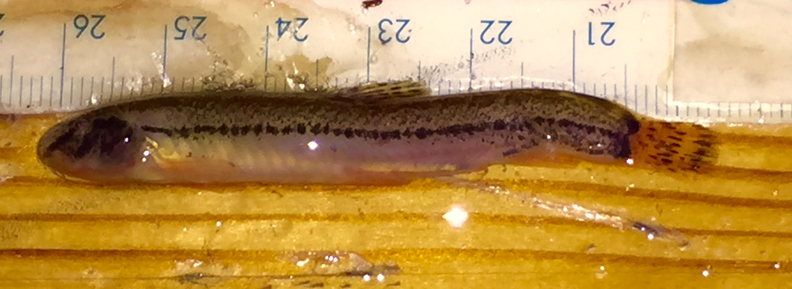 immagine di Sabanejewia larvata